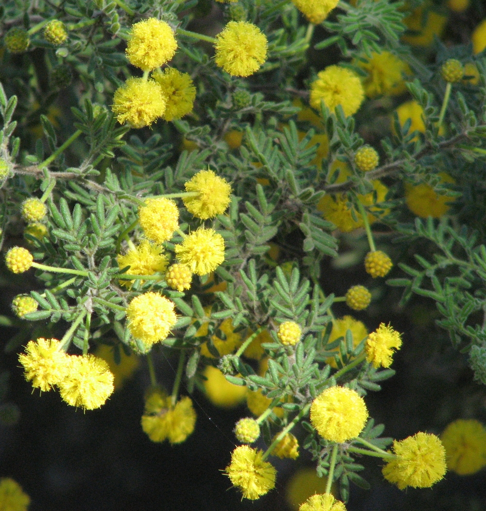 Acacia plicata, Maranoa Gardens, Balwyn, Victoria, Australia